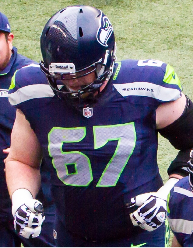 Paul McQuistan, Seahawks vs Rams 12.29.13